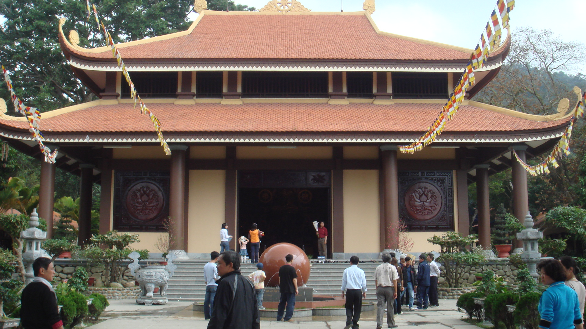 Chùa Lân-Thiền viện Trúc Lâm Yên Tử